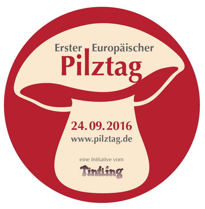 Logo des Europäischen Pilztages